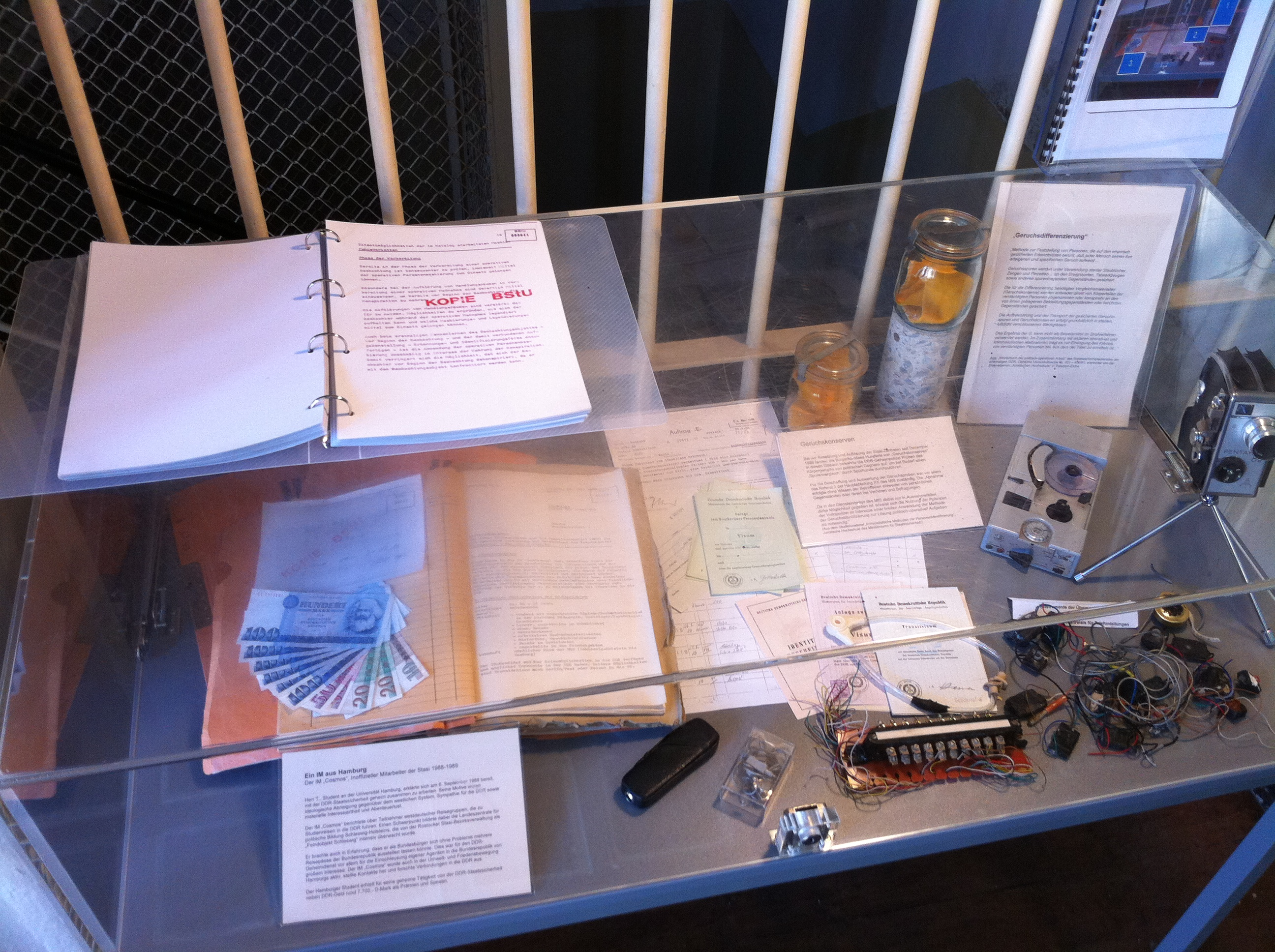 Hansestadt Rostock, Mecklenburg-Vorpommern, Deutschland: Vitrine mit Exponaten der Dokumentations- und Gedenkstätte in der ehemaligen Untersuchungshaftanstalt des Ministeriums für Staatssicherheit (MfS) der Deutschen Demokratischen Republik (DDR); Hermannstraße 34b, Zellentrakt im 1. OG (Zugang über Augustenstraße/Grüner Weg), Hofseite vom „Haus der Justiz“. Die Gedenkstätte befindet sich auf dem ehemaligen Gelände der Bezirksverwaltung des Ministeriums für Staatssicherheit.